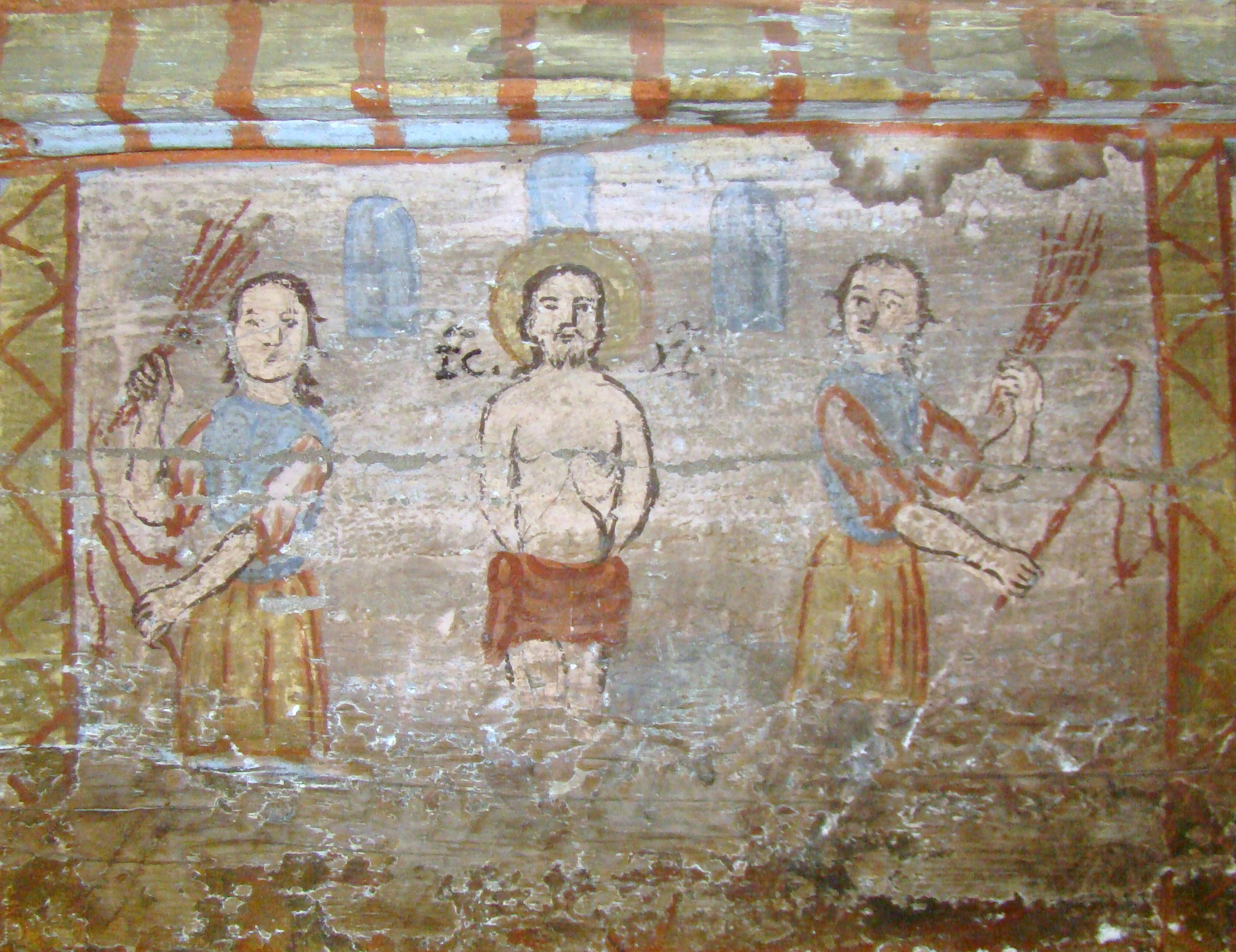 Biserica de lemn "Cuvioasa Paraschiva" , sat STEJERA; comuna MIREŞU MARE